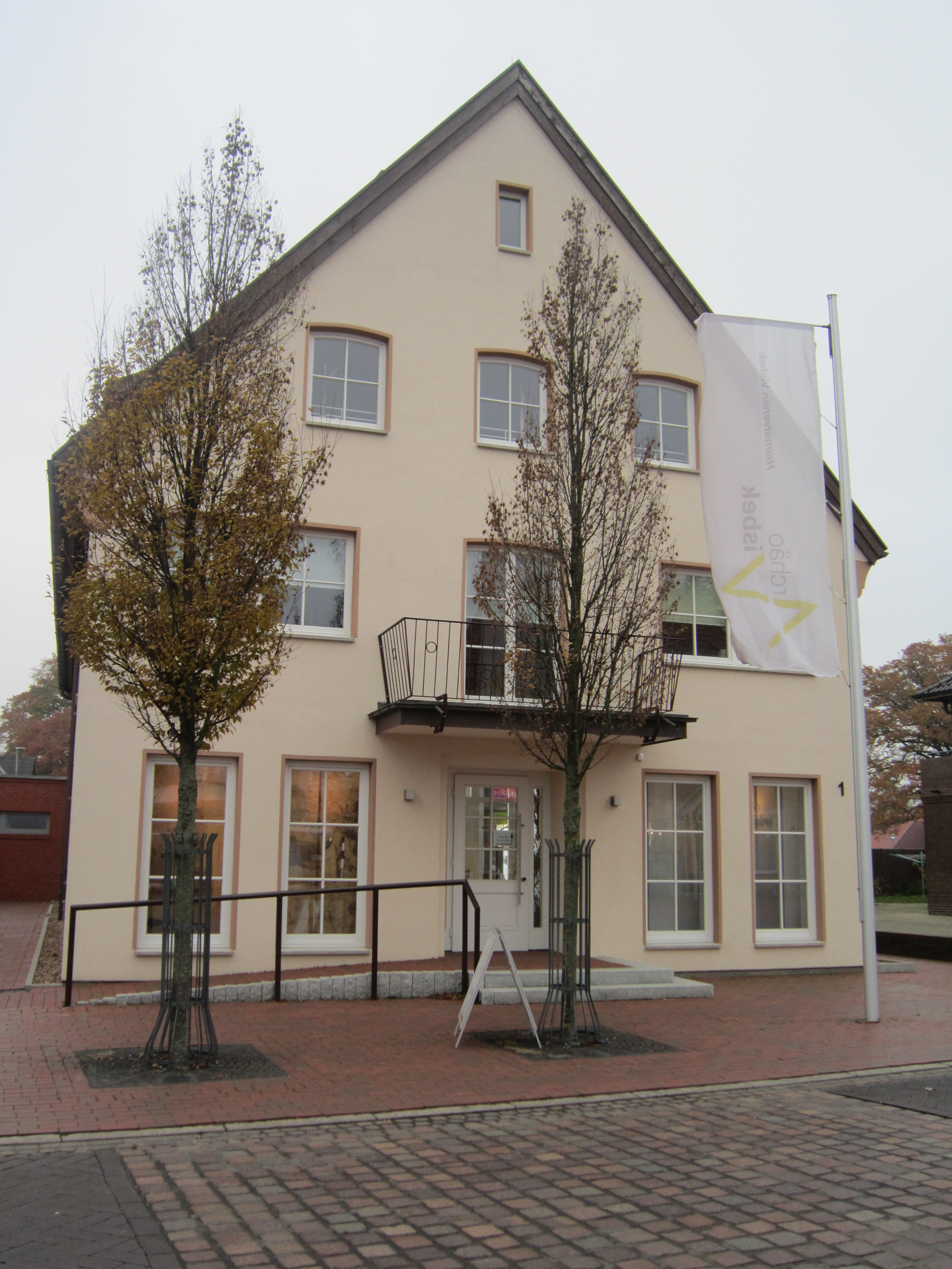 Museumsgebäude in Visbek. Im Erdgeschoss befindet sich die Dauerausstellung "ArchäoVisbek". Der Heimatverein Visbek ist im Obergeschoss untergebracht.